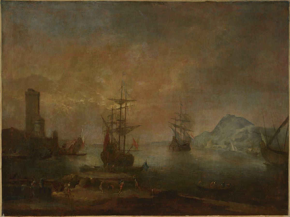 Sanguine